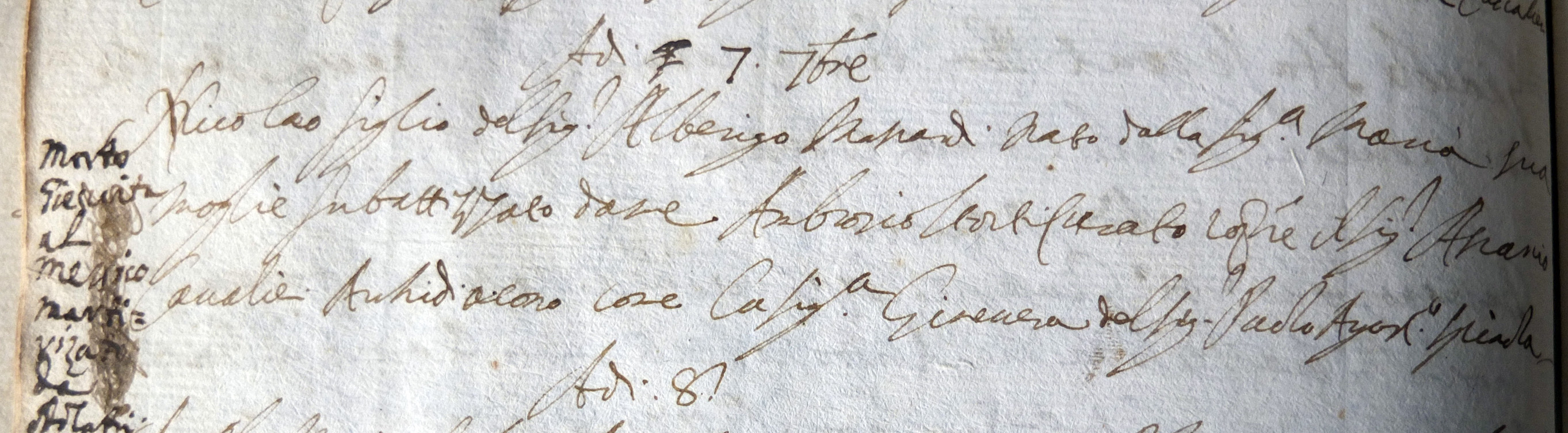 It's a photographic old document released by Biblioteca Niccolò V of Sarzana - Italy